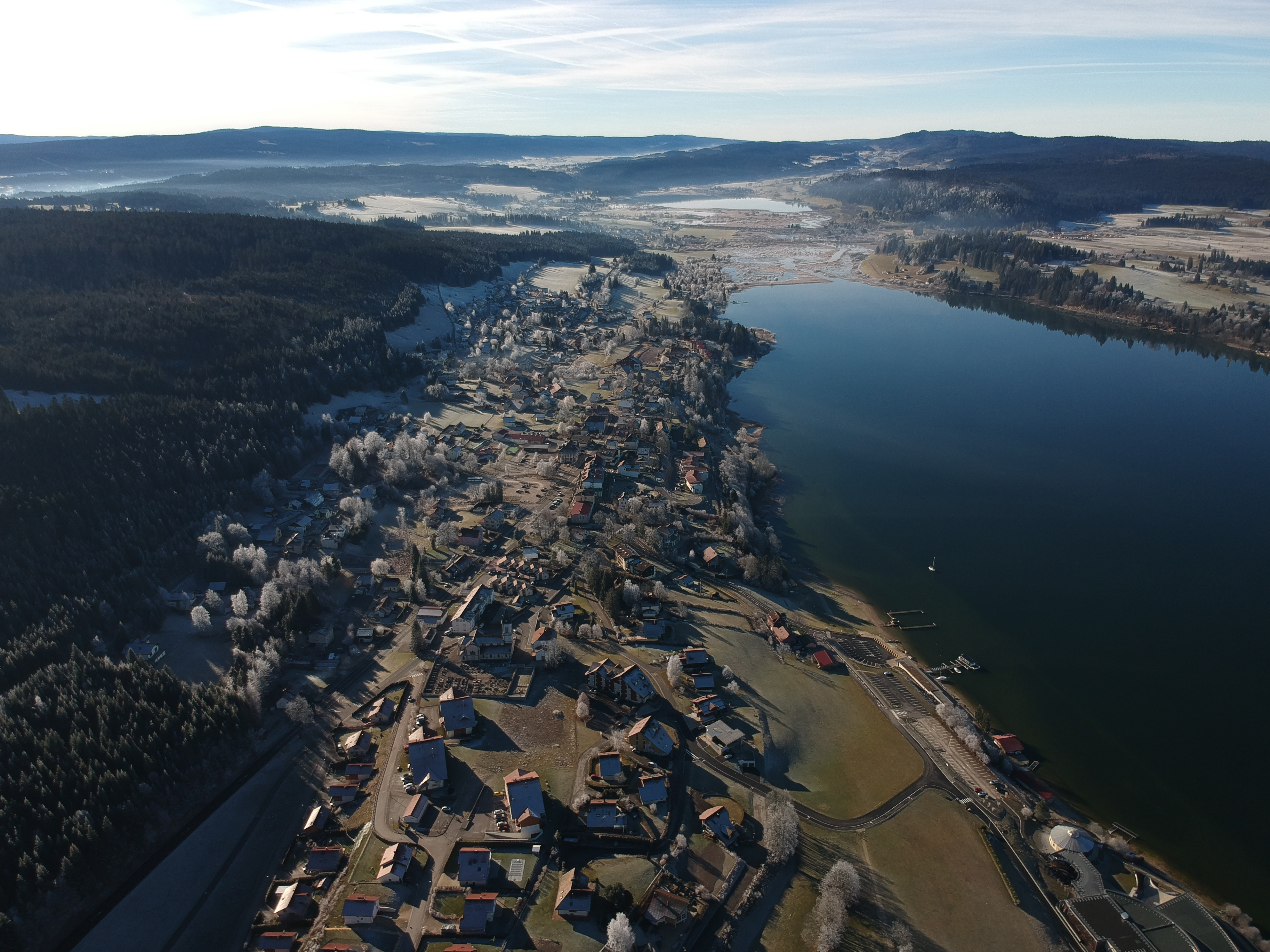 Vue de la commune de Malbuisson sur le bord du Lac de Saint-Point. Au fond le Lac de Remoray.